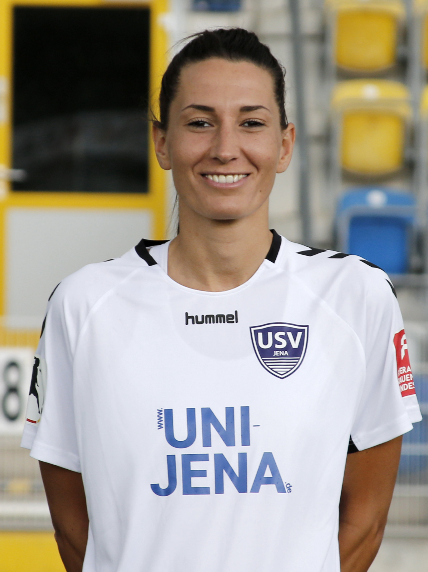 Marza Julevic